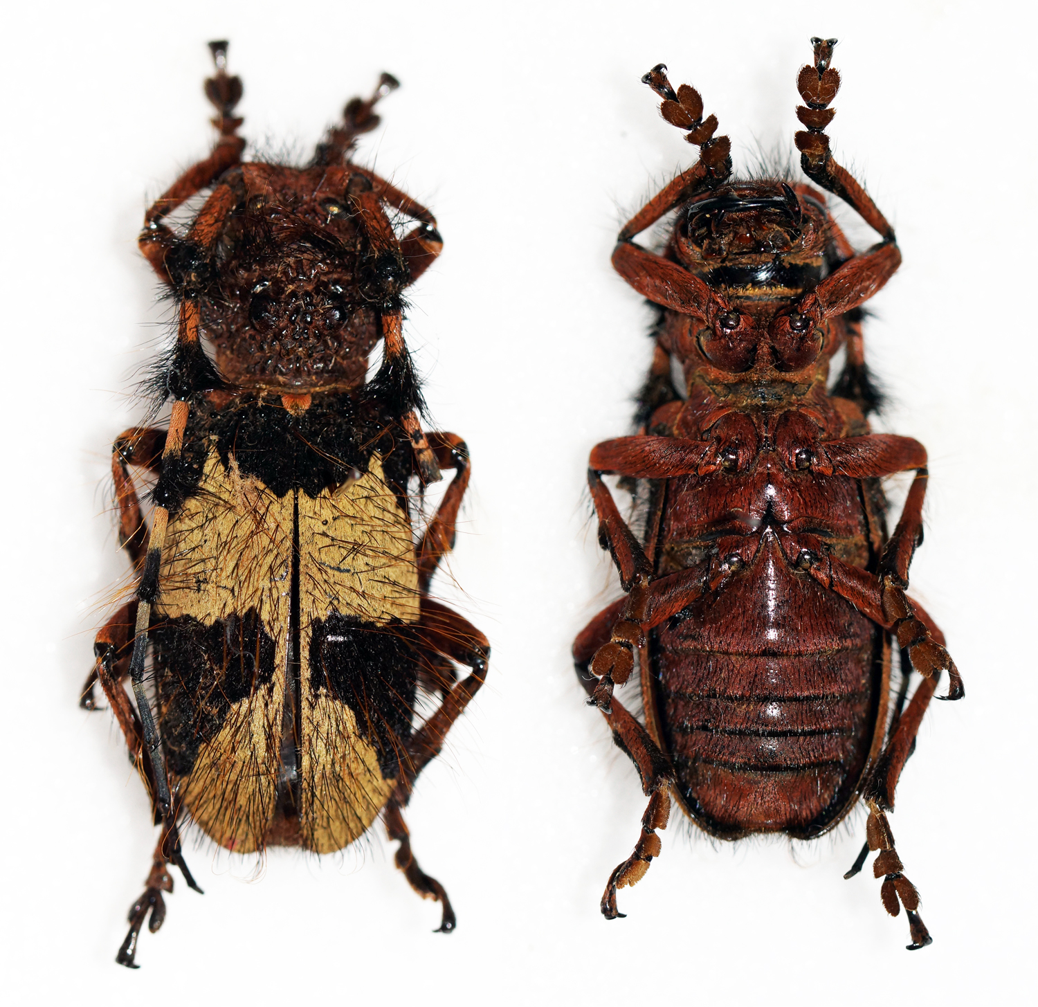 Aurivillius,1902 Sex: Female Data: 07-2011 - Mau Son - Lang Son - Vietnam